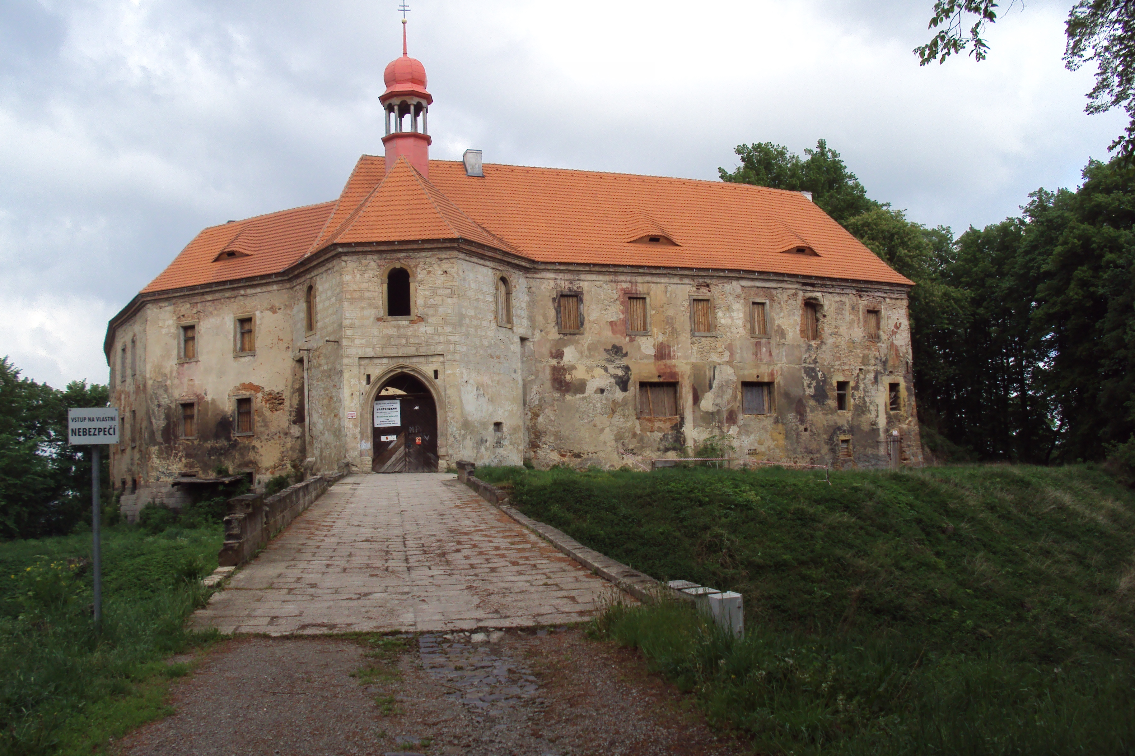 Zámek Vartenberk nad Stráží pod Ralskem